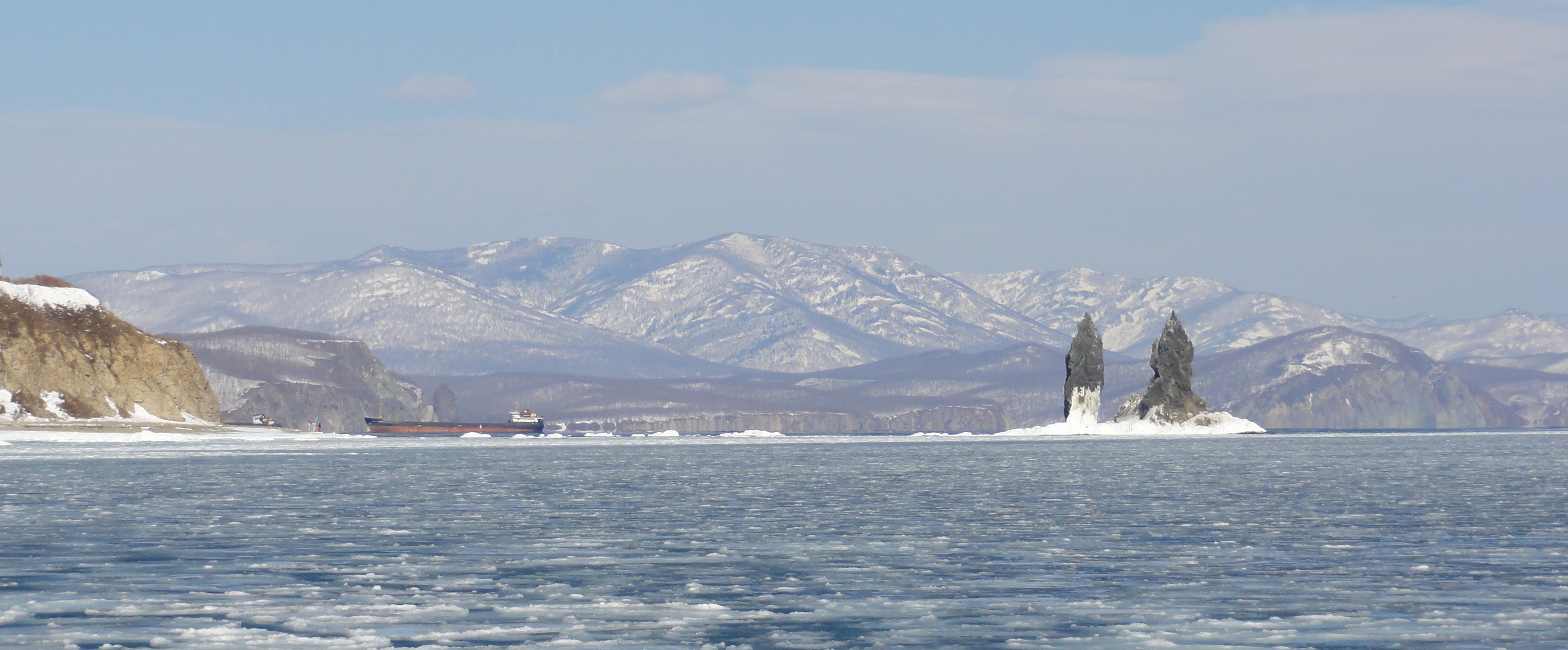 Кекуры Два Брата на фоне бухты Рудная